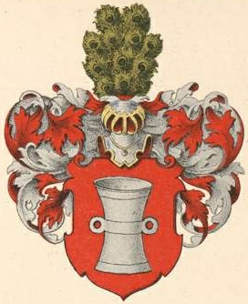 Knorringi suguvõsa aadlivapp (Kuramaa)